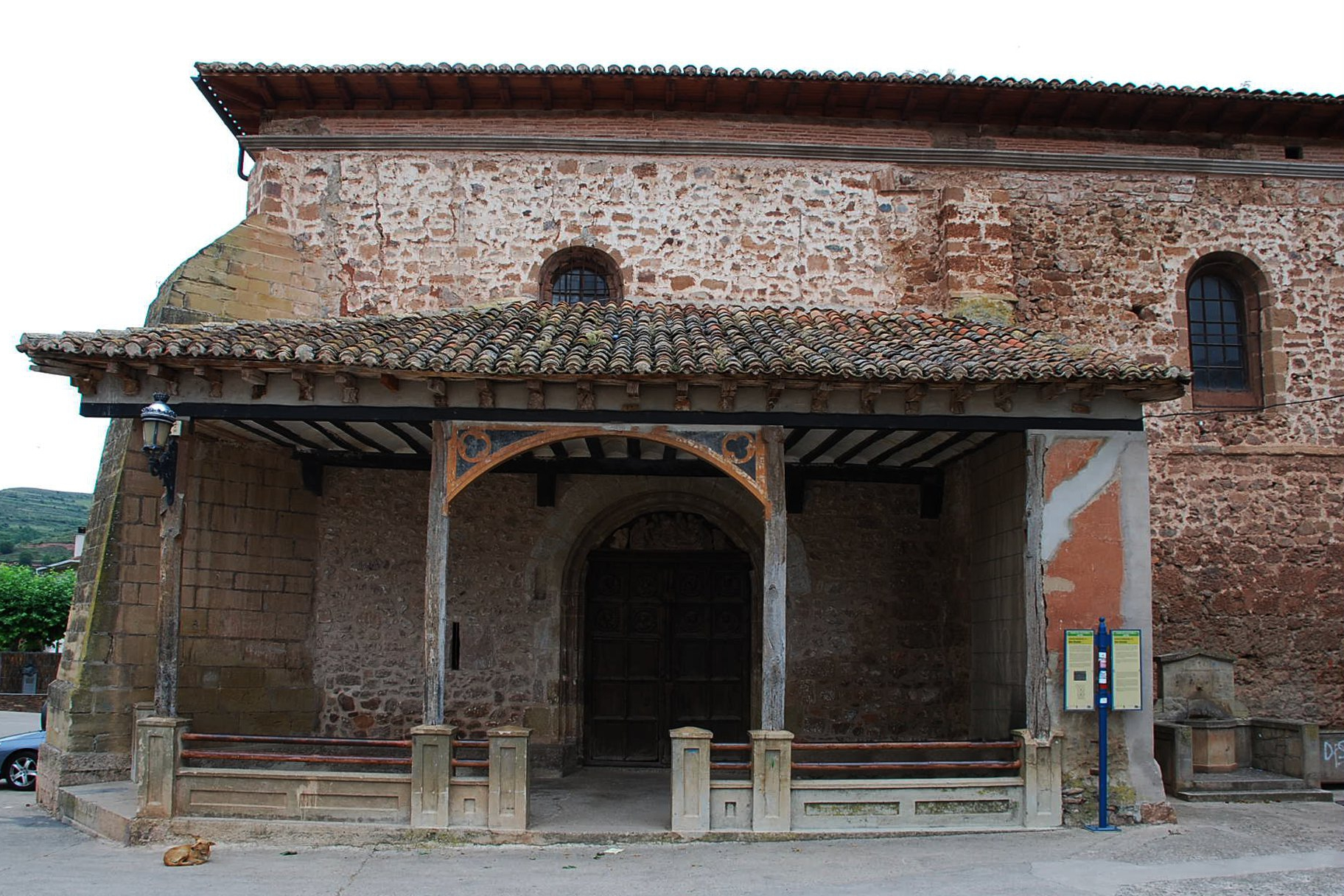 Iglesia de San Román en Matute (La Rioja - España)